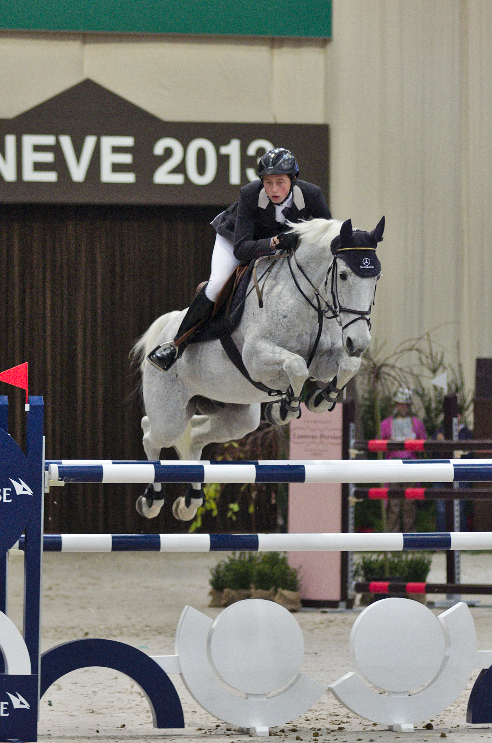 CHI Genève 2013 - 20131212 - Martin Fuchs et Principal 12